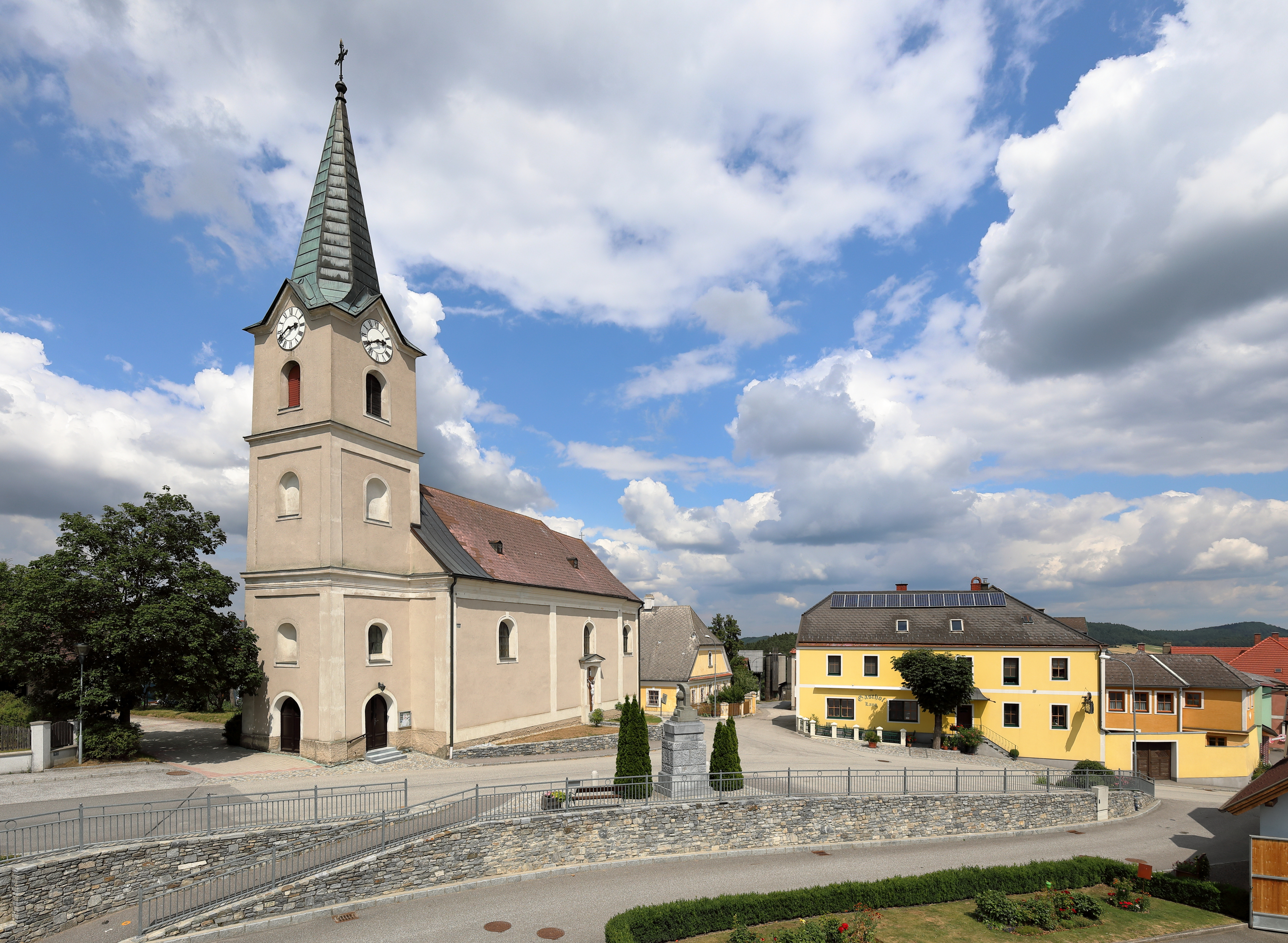 Ortszentrum der niederösterreichischen Gemeinde Weinzierl am Walde mit der 1788 errichteten Pfarrkirche.